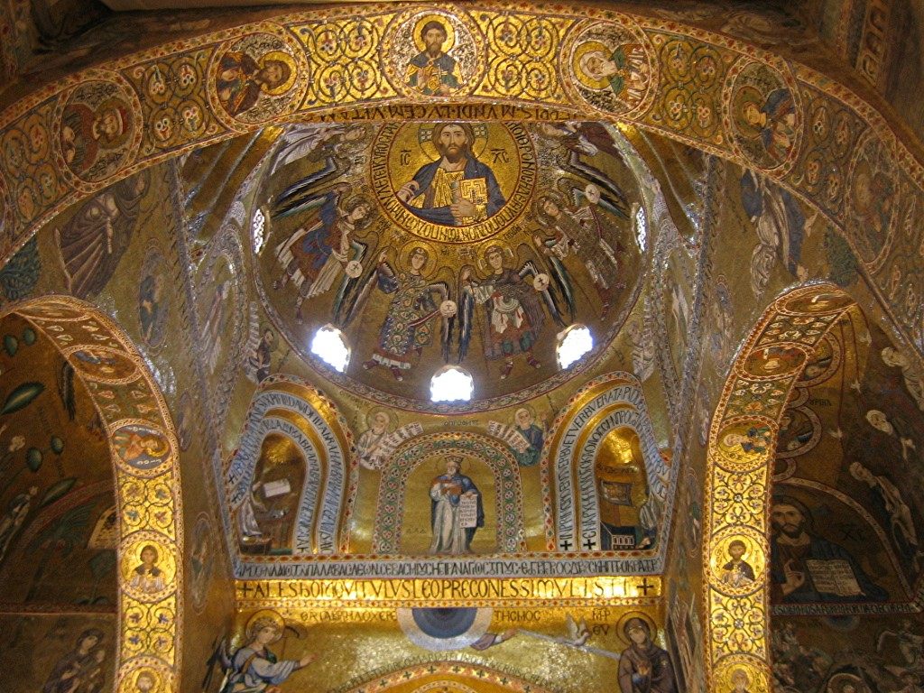 Capella Palatina a Palermo, Sicilia